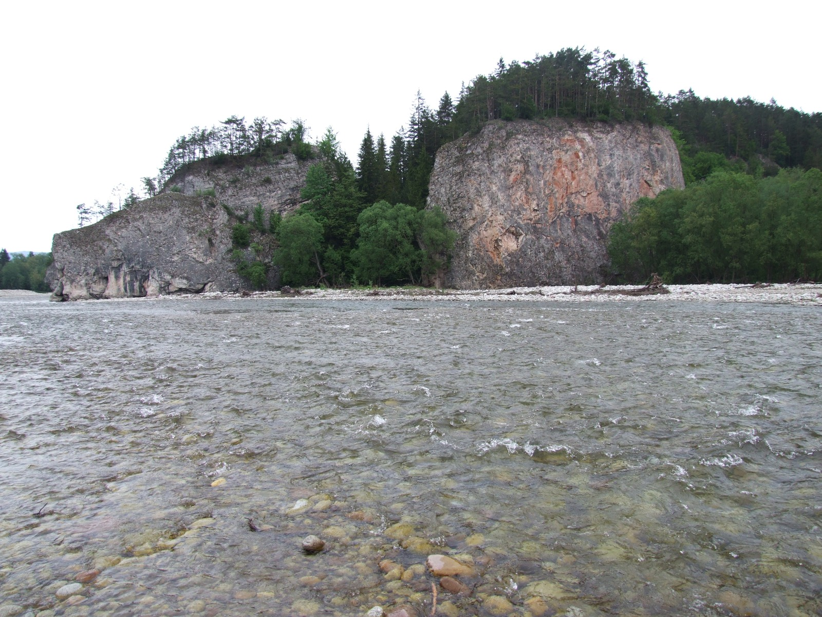 Kramnica w Przełomie Białki pod Krempachami